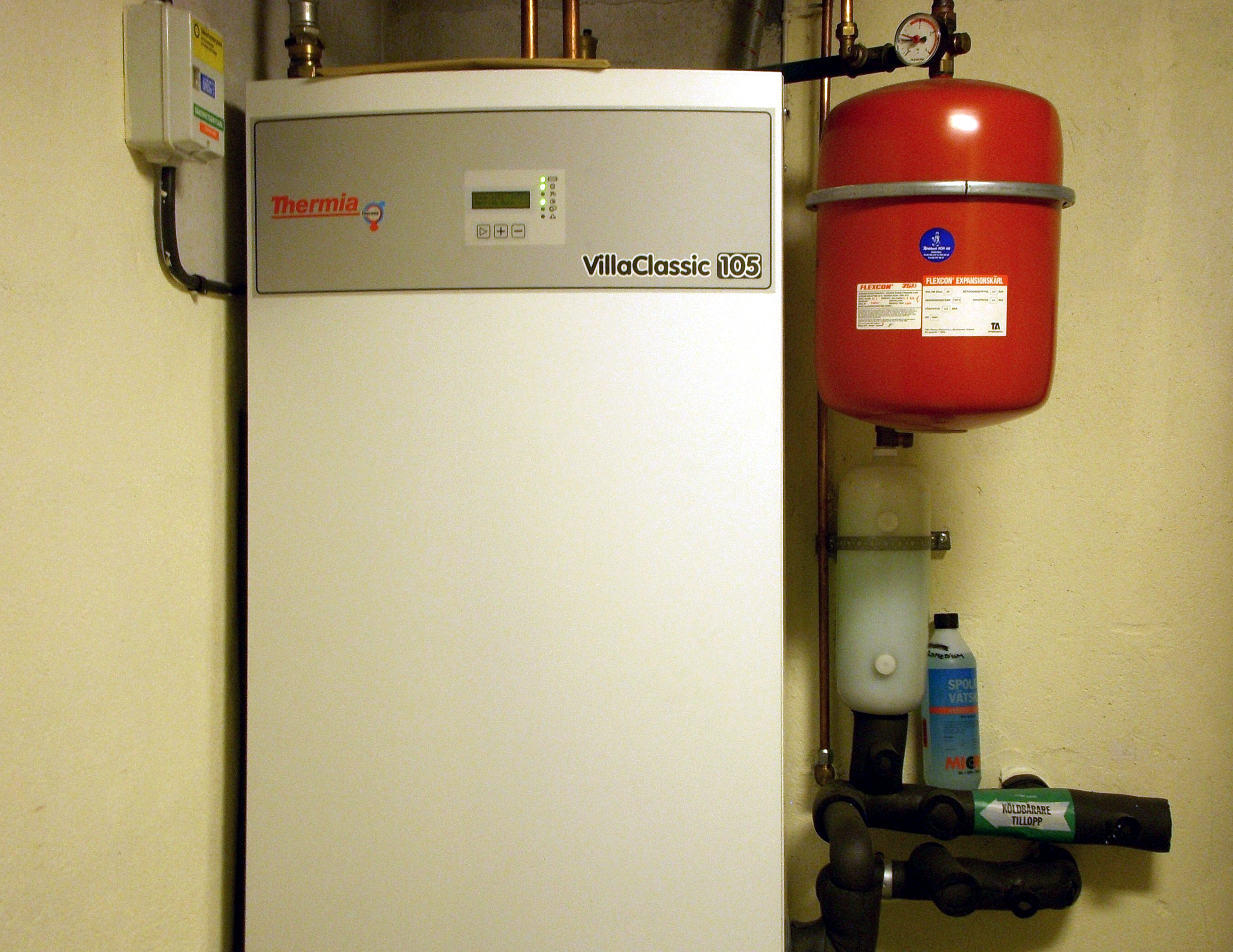 Värmepump, Thermia Villa Classic 105